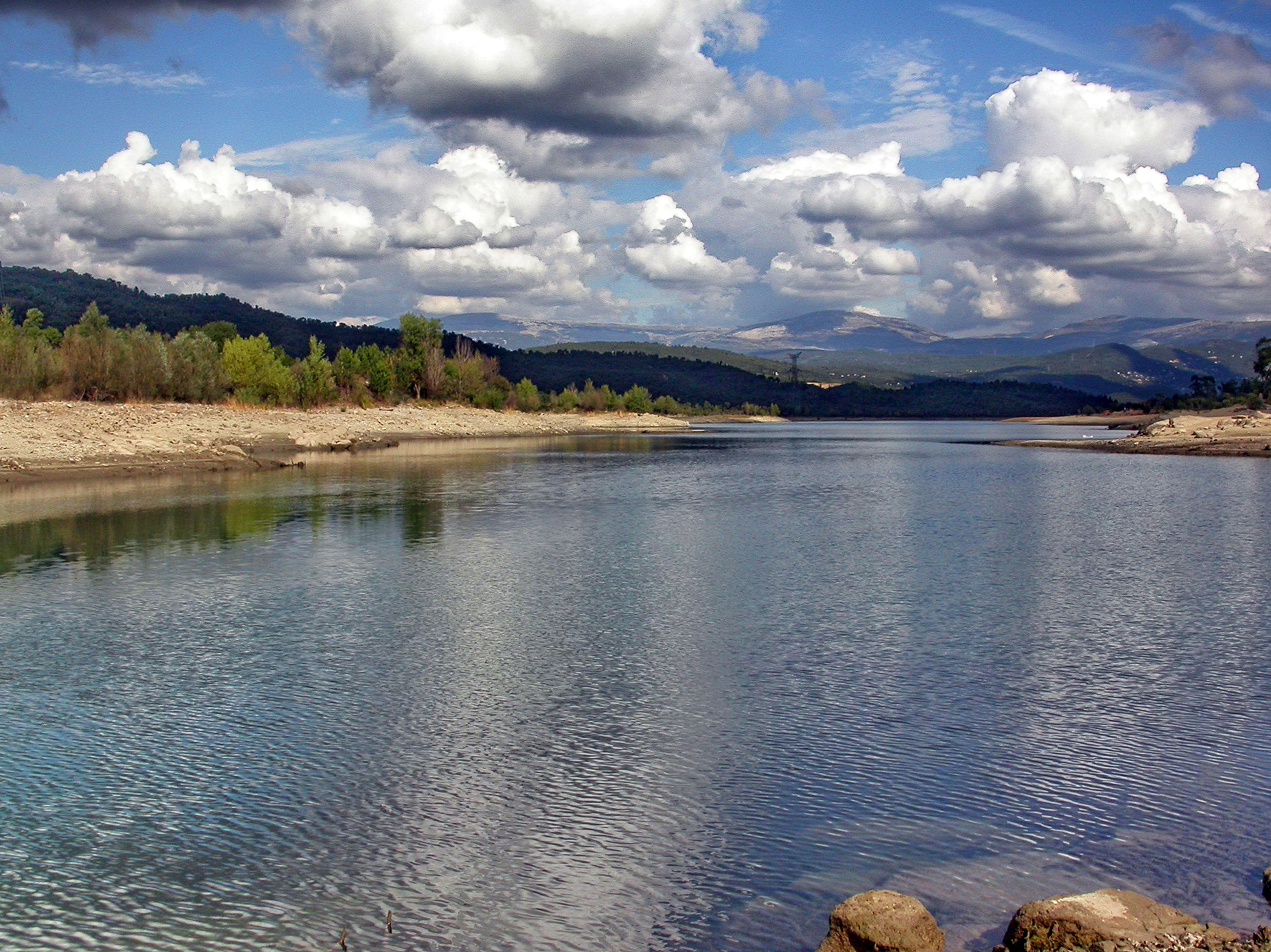 Lac de Saint-Cassien, les Trois-Communes lors du marnage de 2006